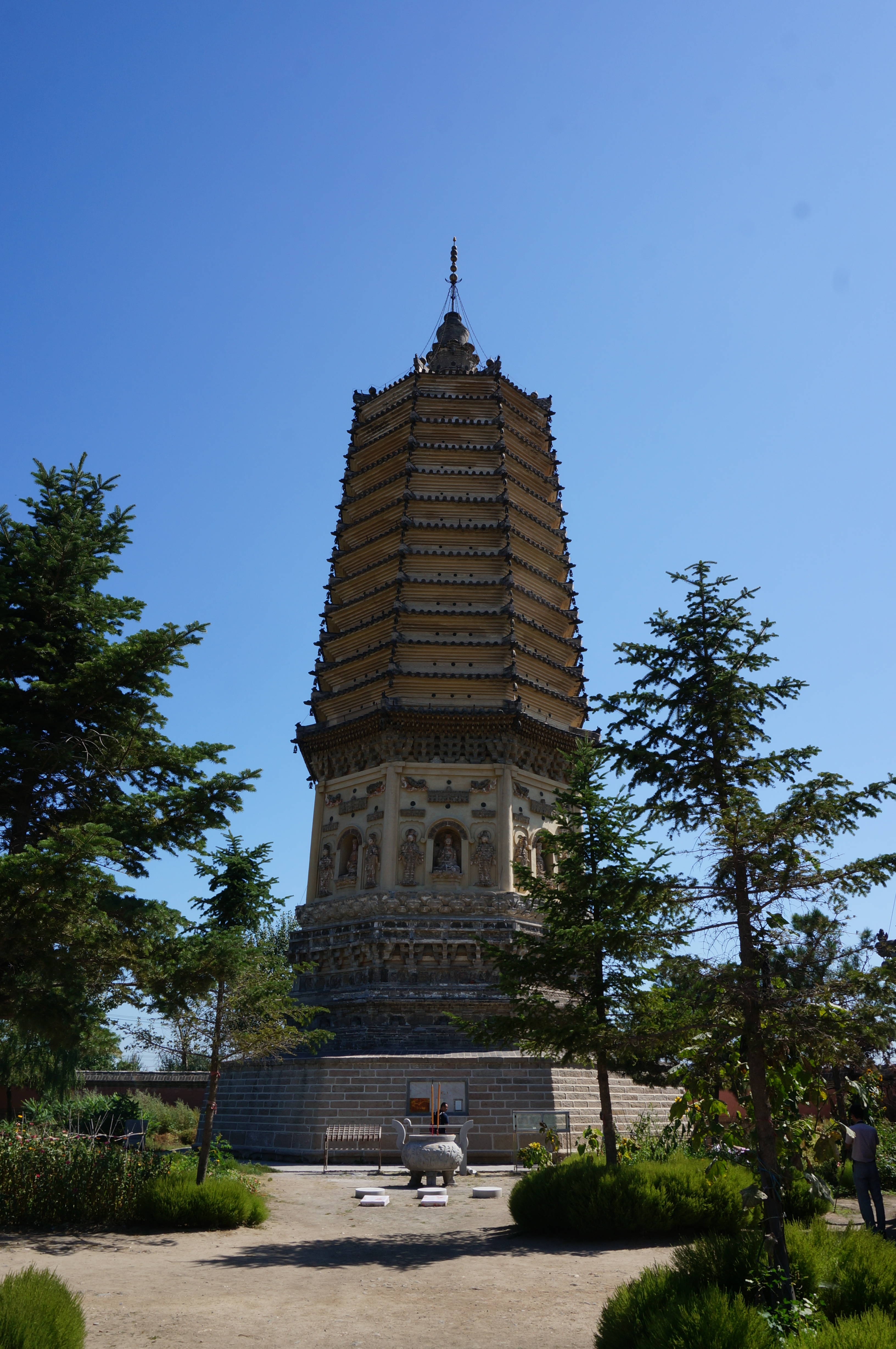 北镇崇兴寺双塔，东塔西面。